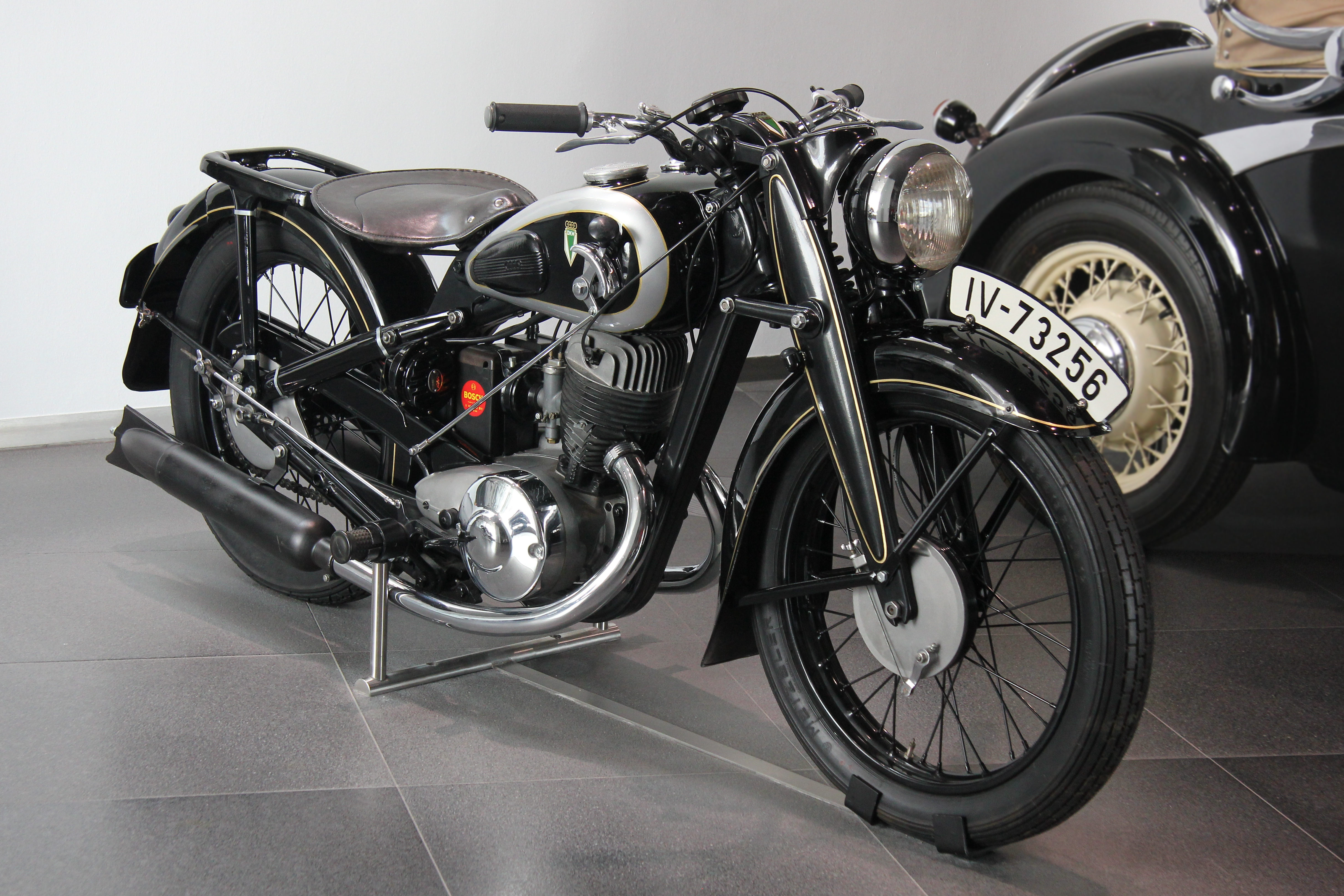 DKW NZ 350, Baujahr 1939, im museum mobile in Ingolstadt. Einzylinder-Zweitaktmotor, 346 cm³, 11,5 PS bei 4000/min; Preis: 875,00 RM, gebaut 45.300 Stück von 1938 bis 1945